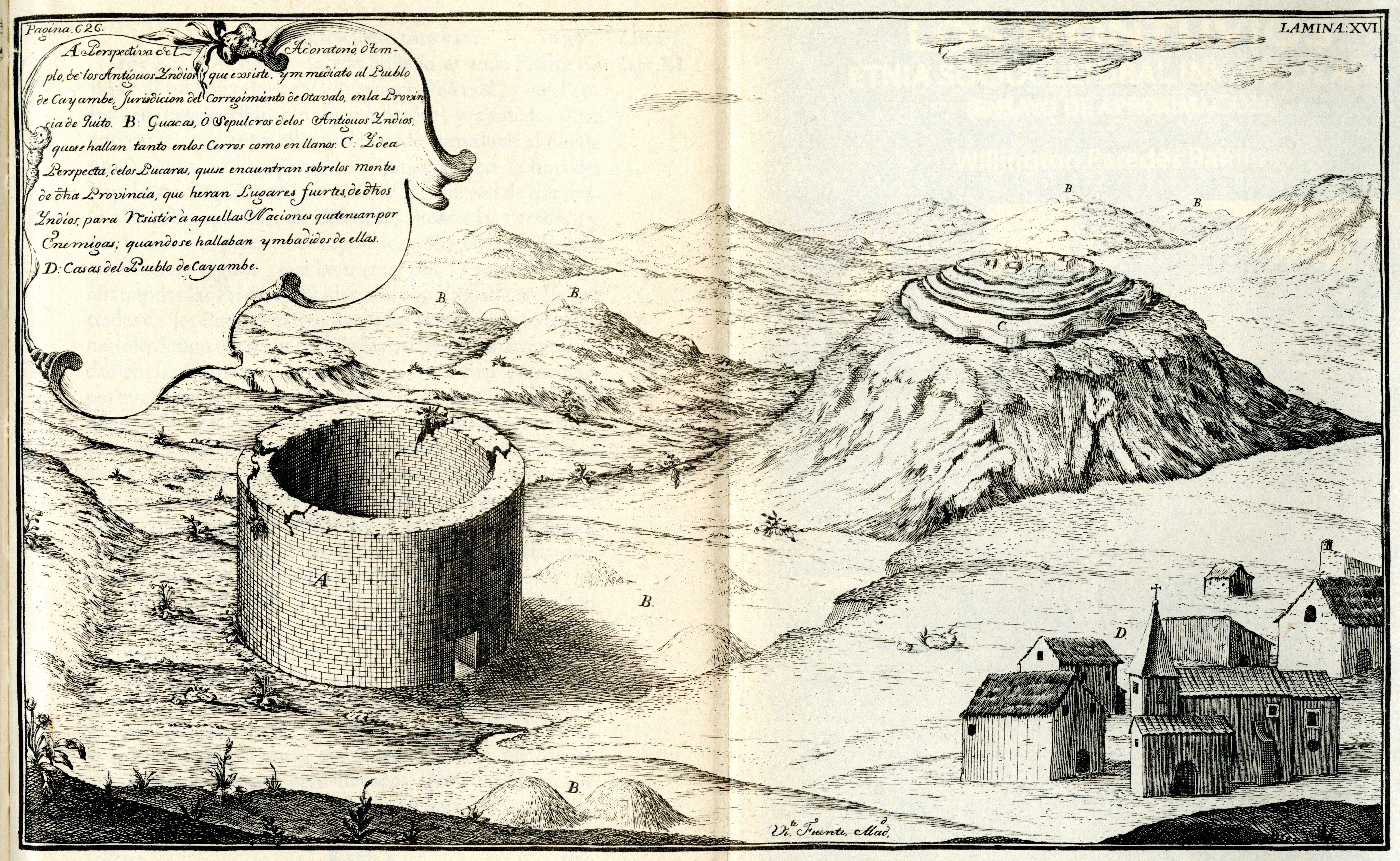 De Ulloa, Antonio y Jorge Juan. Relación Histórica del Viaje a la América Meridional, hecho de Orden de Su Majestad Católica para medir algunos Grados de Meridiano Terrestre, y venir por ellos en conocimiento de la verdadera Figura y Magnitud de la Tierra, con otras varias Observaciones Astronómicas y Físicas. Por Don Jorge Juan Comendador de Aliaga, en la Orden de San Juan, Socio correspondiente de la Real Academia de las Ciencias de París; y Don Antonio de Ulloa de la Real Sociedad de Londres: ambos por Capitanes de Fragata de la Real Armada. Primera Parte / Tomo I. Impresa por la Orden del Rey Nuestro Señor en Madrid por Antonio Marín, Año de MCDDXLVIII (1748). Diapositiva de Consulta y acceso publico cuya información fue investigada de un libro y/o ejemplar de revisión custodiado en los Fondos Bibliográficos (Sección Siglo XVIII o Etapa Colonial) del Archivo Histórico del Guayas; Guayaquil, Ecuador